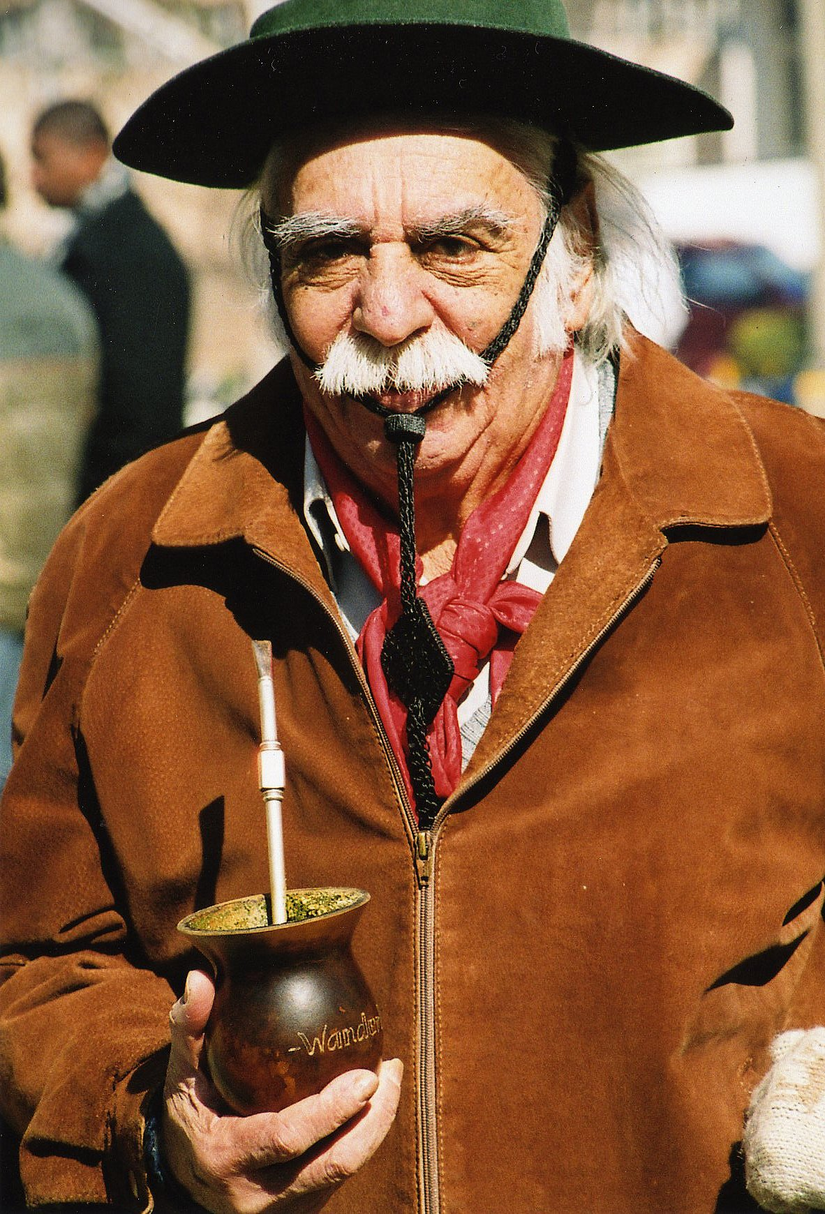 Paixão Côrtes mateando em Santana do Livramento - Rio Grande do Sul - Brasil, sua terra natal.